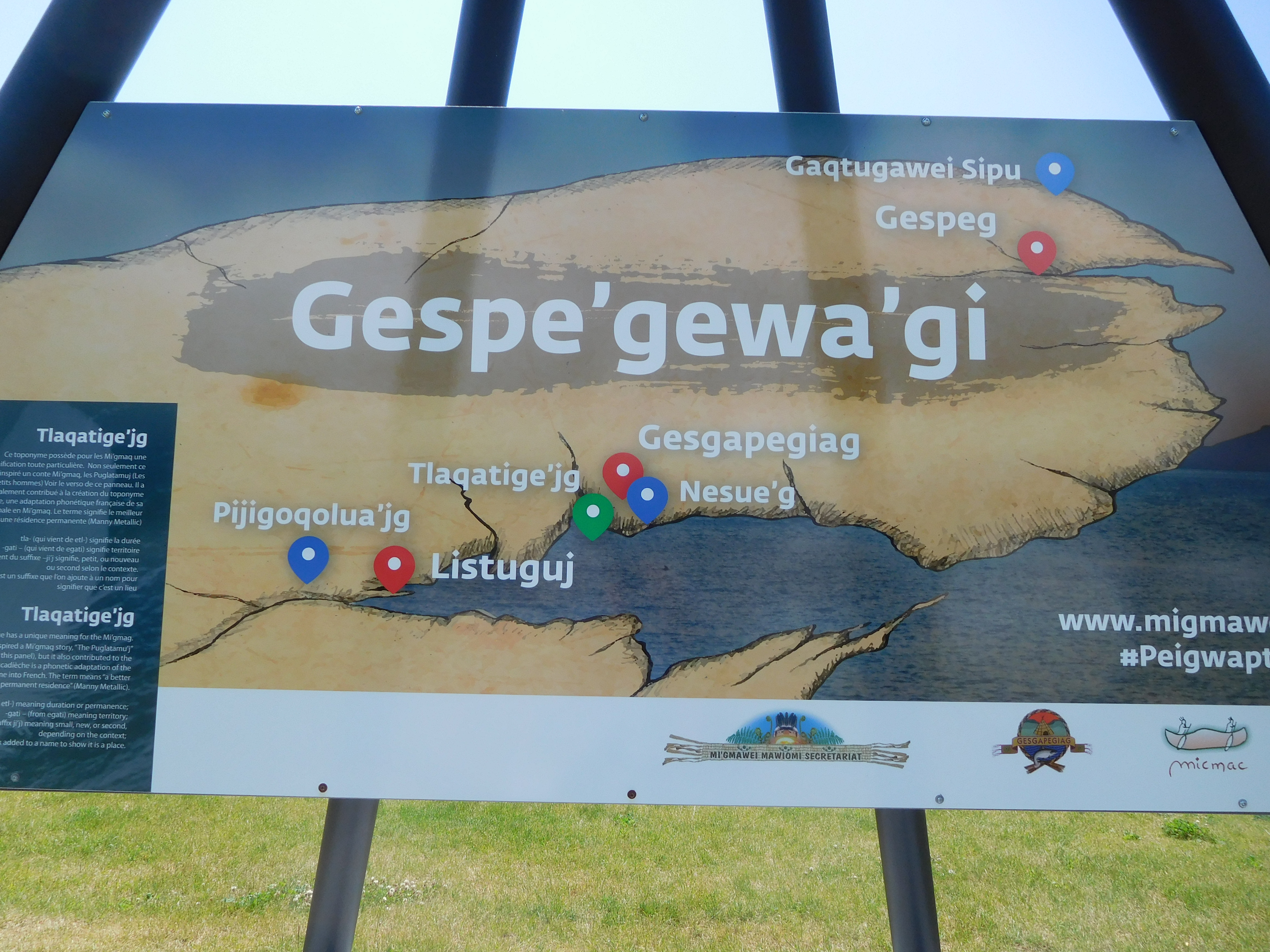 Parc des Horizons, plage de Carleton-sur-Mer